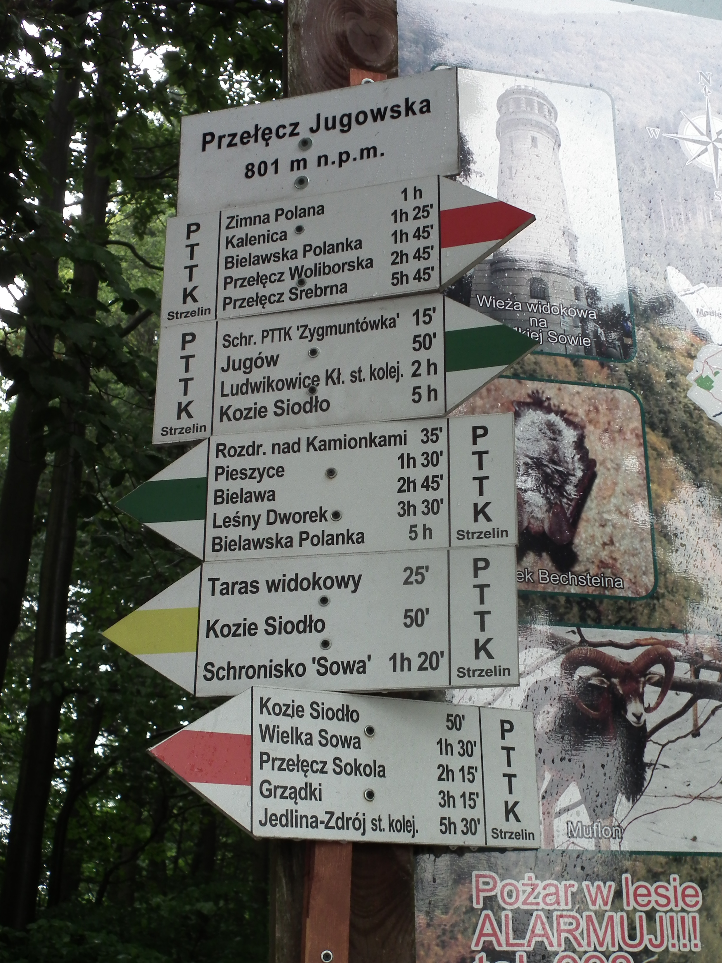 Oznaczenia szlaków w Górach Sowich.